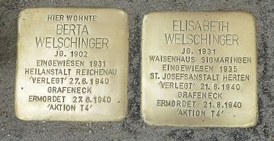 Stolpersteine für Berta und Elisabeth Welschinger, Markelfingen